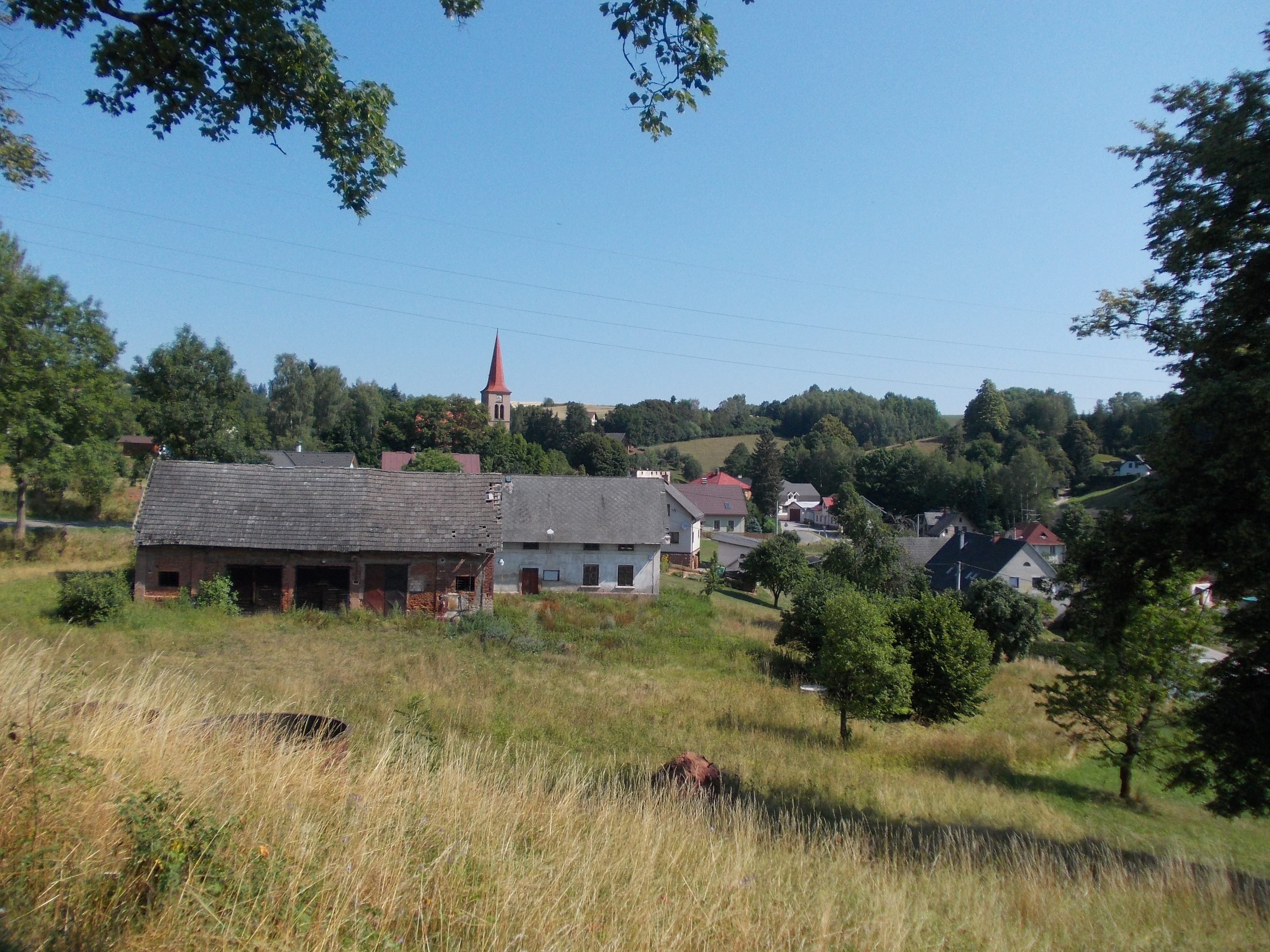 Čermná - celkový pohled od JZ